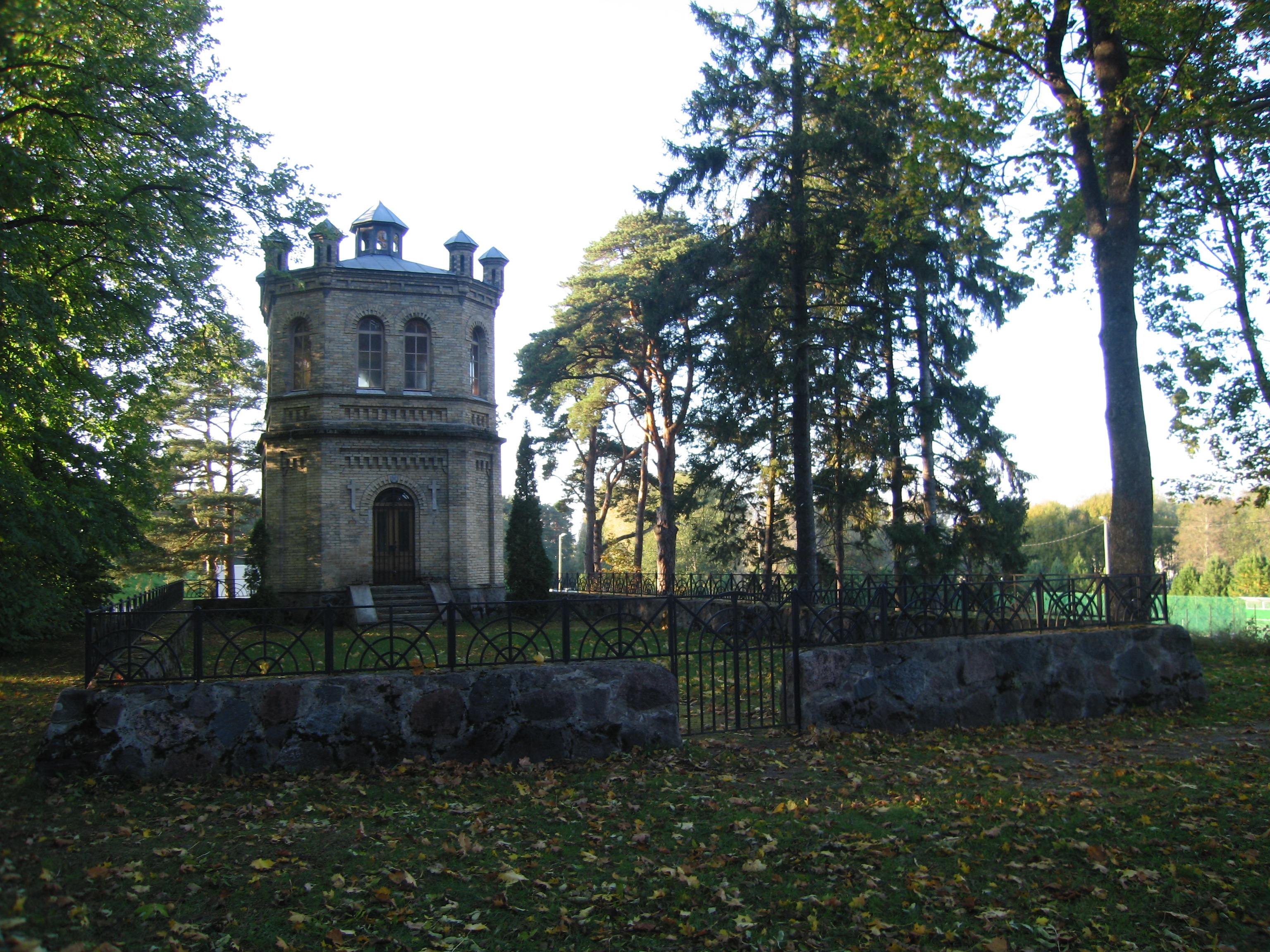 Vaade Kose mõisa kalmistule ja selle kabelile. Foto: Robert Treufeldt , 05.10.2014